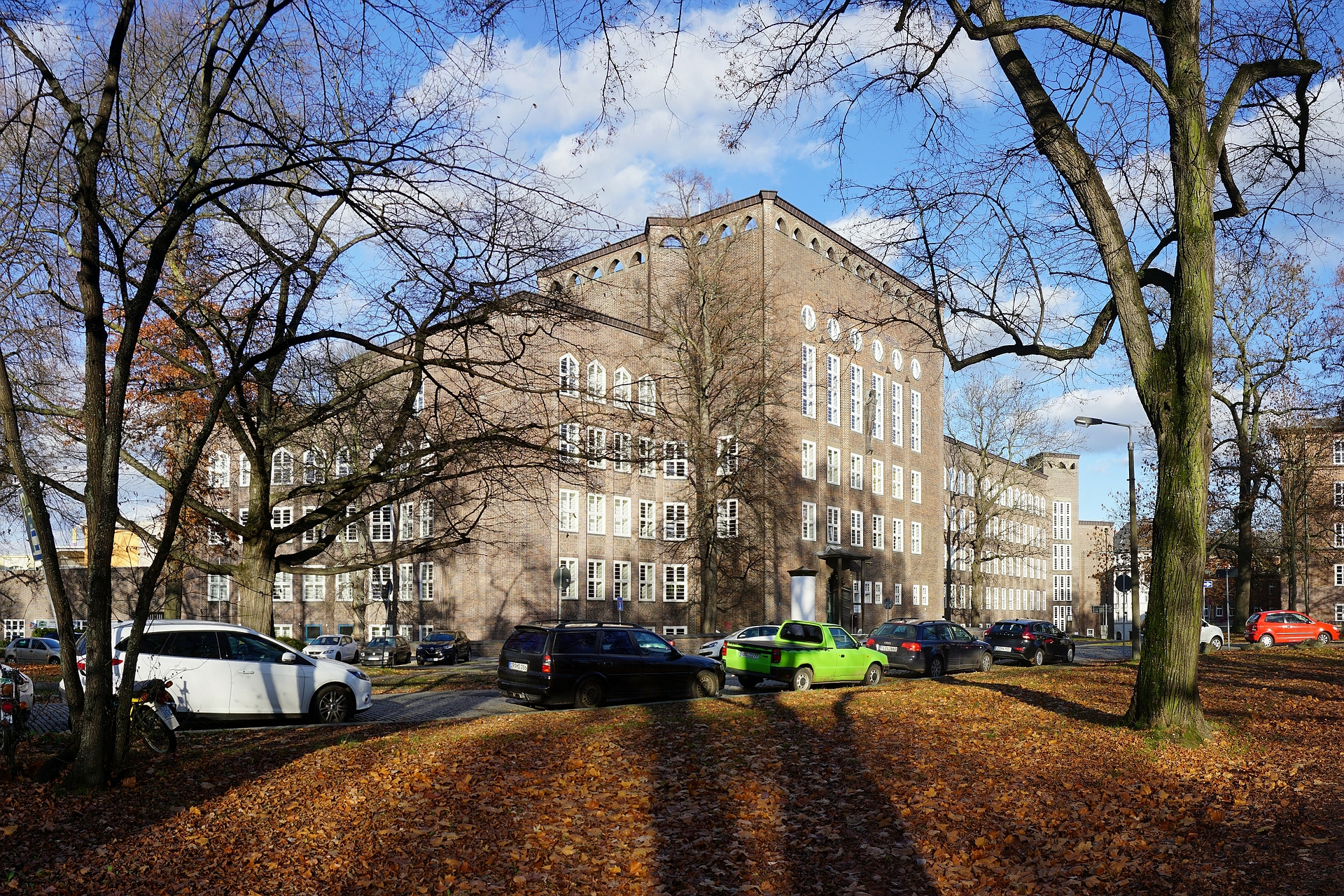 Die Industrieschule Chemnitz 2015